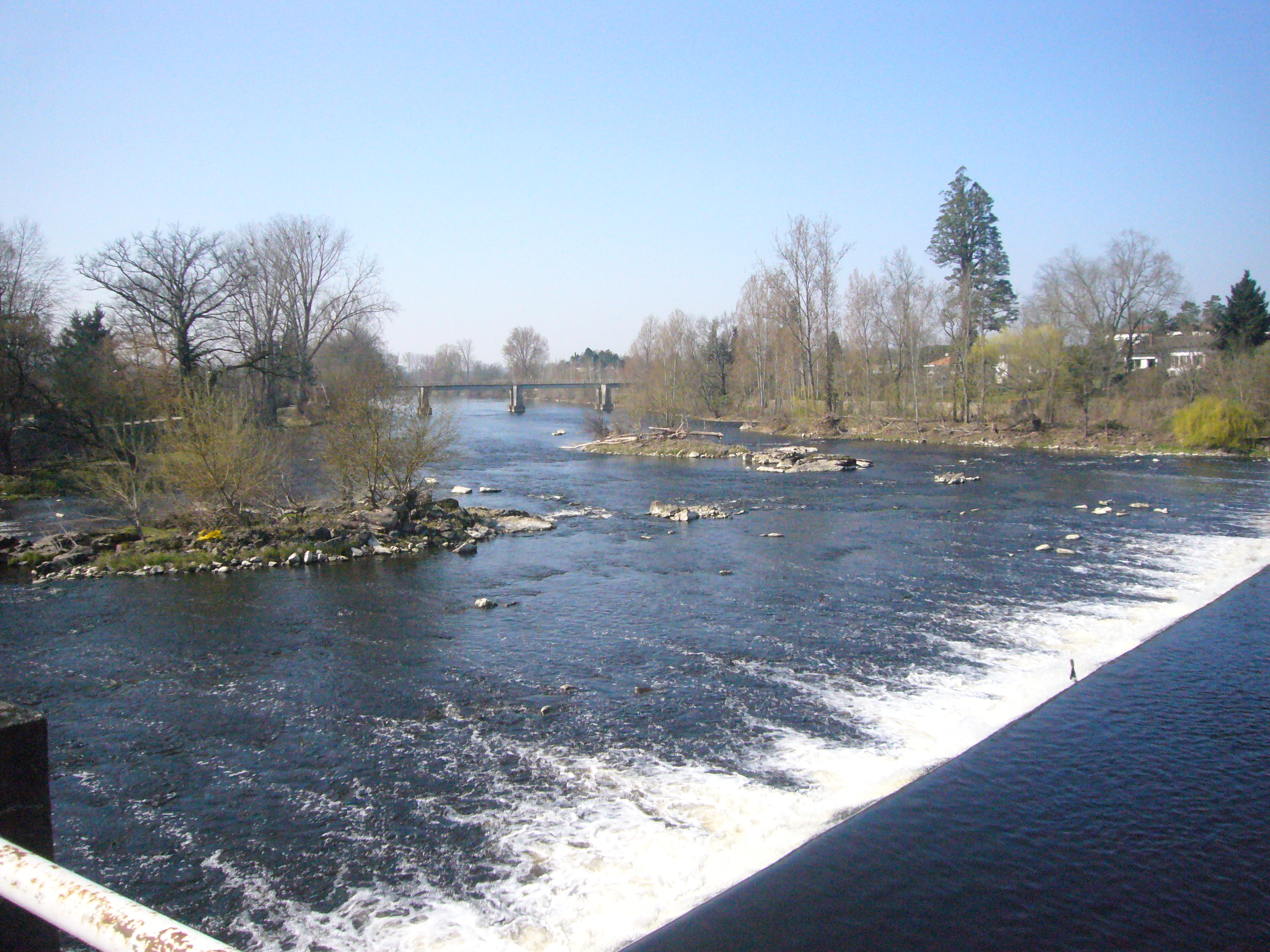 La Vienne à Chabanais (16, France)